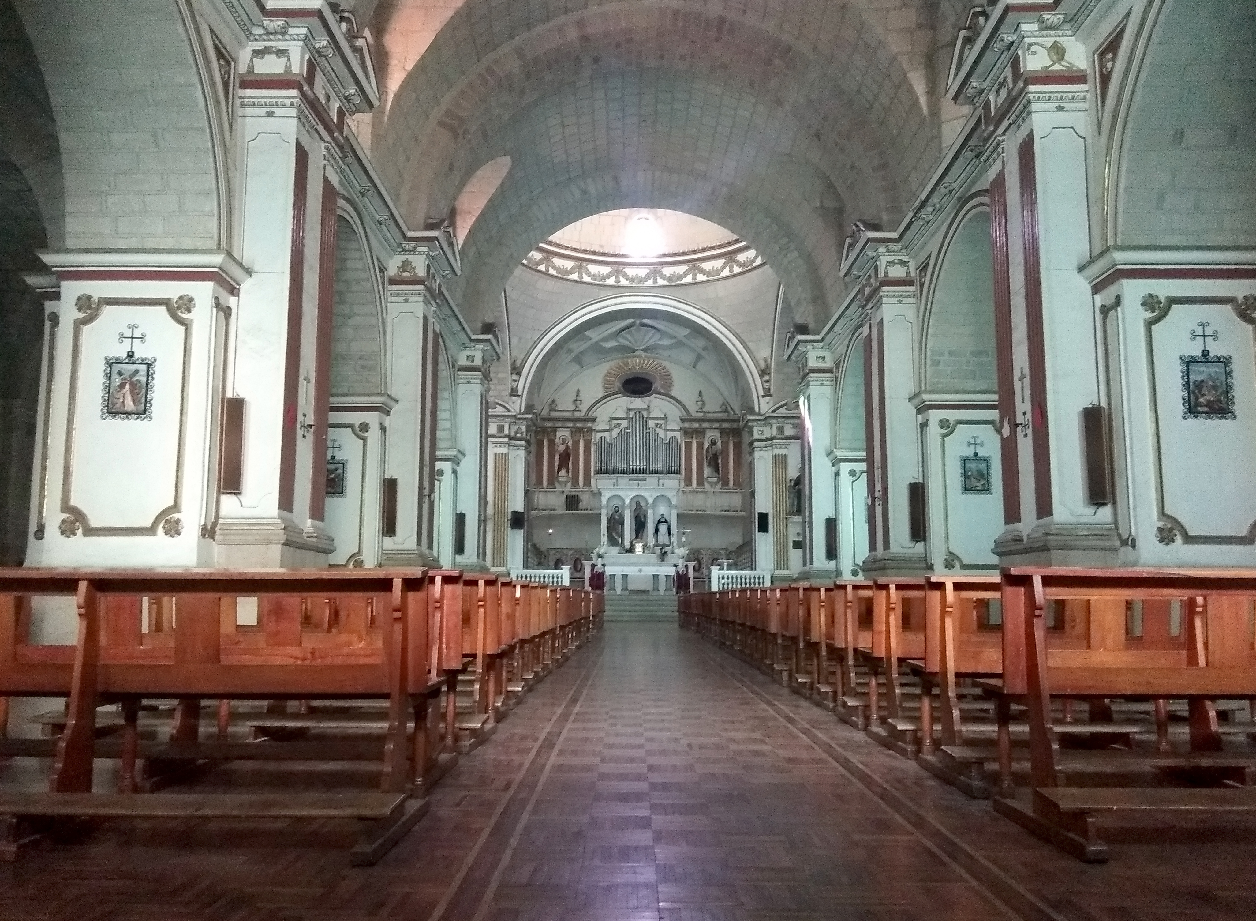 Iglesia de Santo Domingo This medium shows the protected monument with the number L/00-051 in Bolivia.